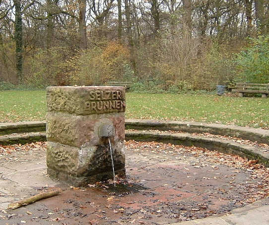 Der Selzerbrunnen, ein schwefelhaltiger Mineralbrunnen in Frankfurt-Nied im Niddawäldchen östlich der Eisenbahnersiedlung, Wasser riecht leicht nach Schwefelwasserstoff und ist wohl auch eisenhaltig. Vor dem Krieg war es ein Spaß für die Kinder, einen Finger in dne Brunnen zu stecken und danach das ausströmende Gas zu entzünden.